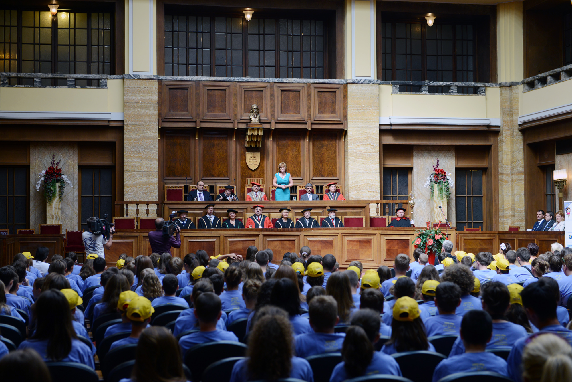 Detská univerzita Komenského 2013